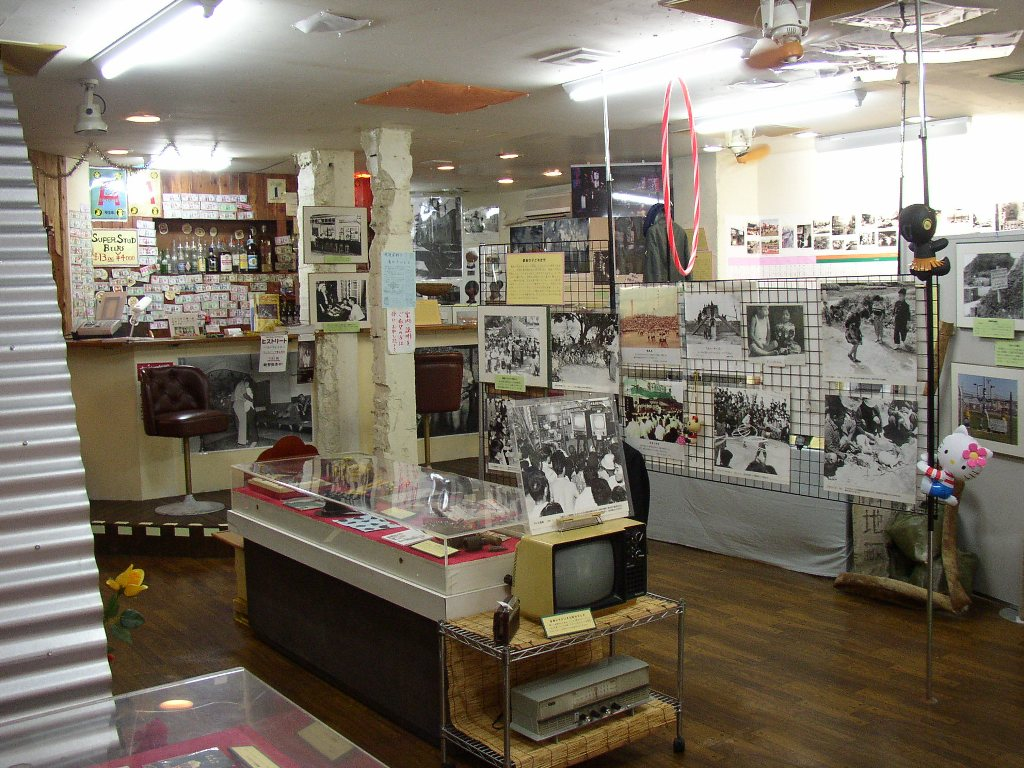 ヒストリートの内観